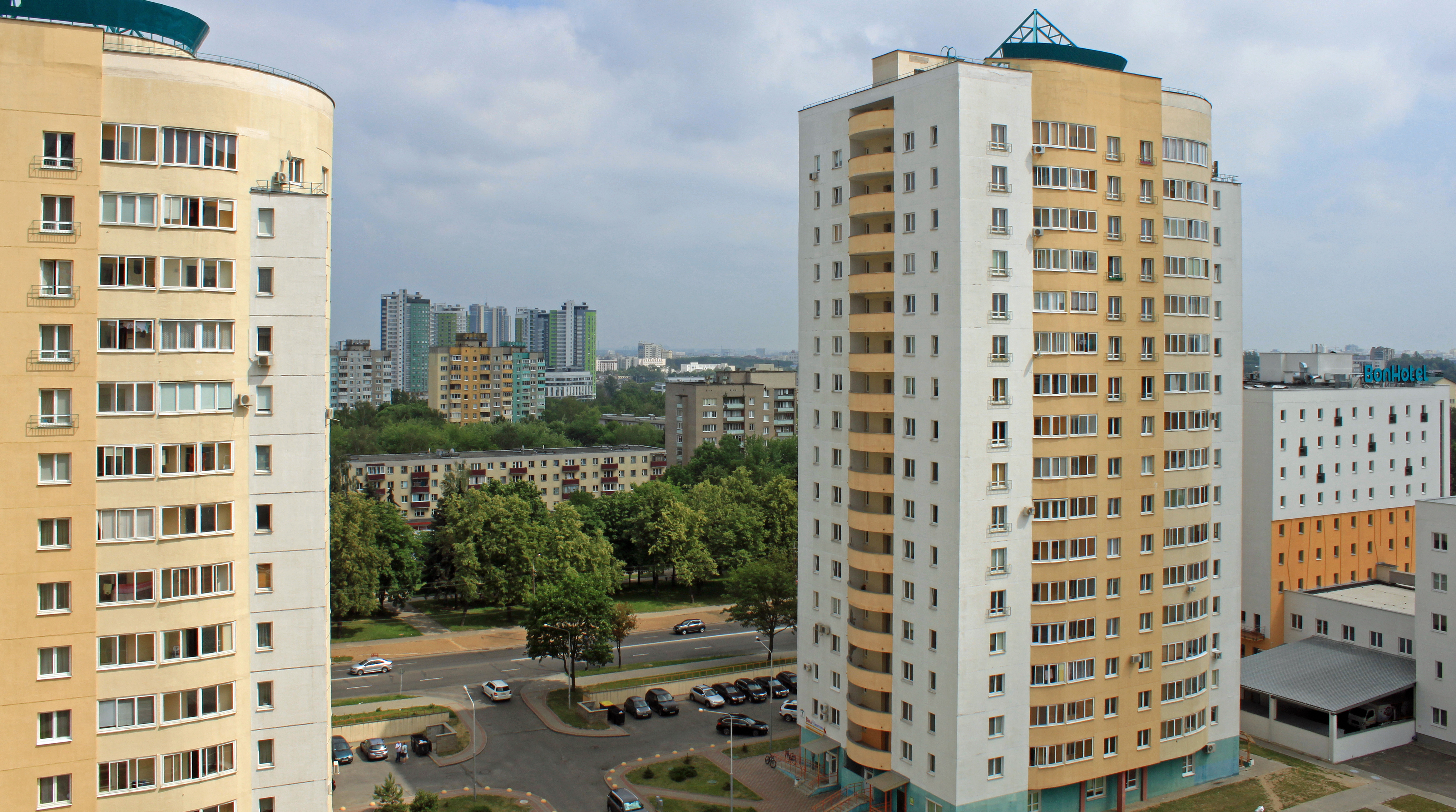 Минск, Фрунзенский район, лето 2016 года